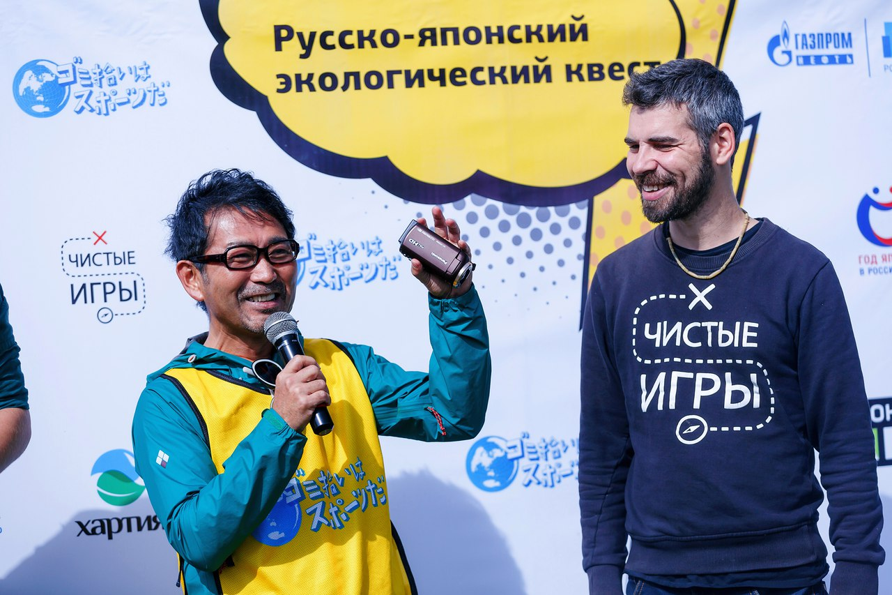 Экологический квест Чистые Игры в парке Кузьминки, Москва, 9 сентября 2017